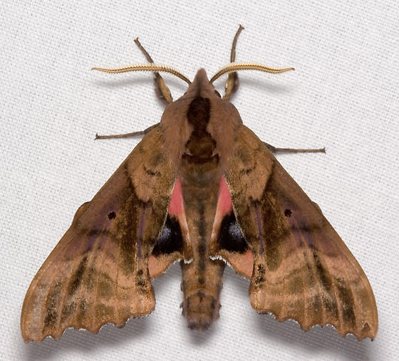 Paonias excaecatus